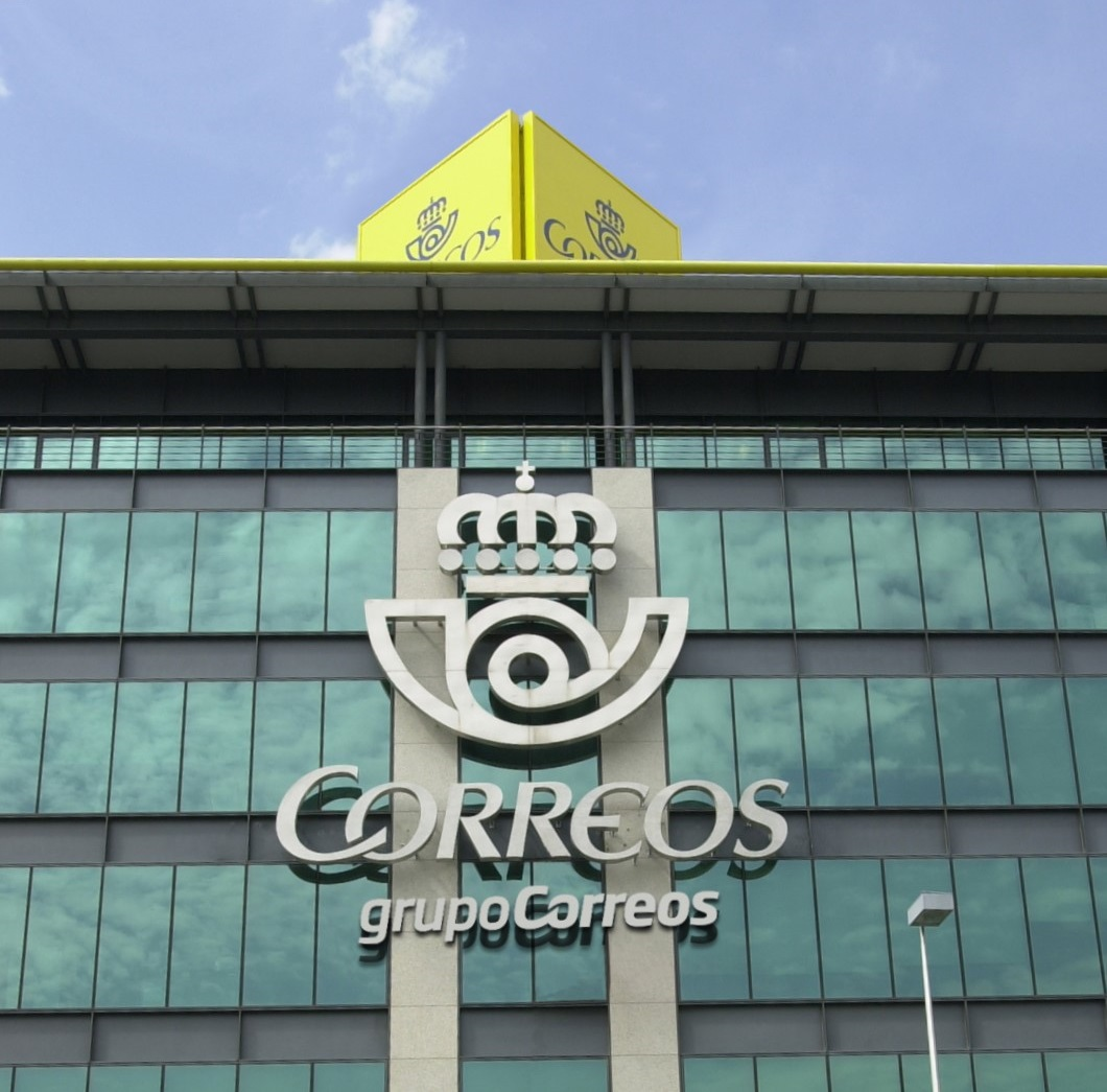 Fachada del edificio principal de Correos en Madrid (Campo de las Naciones).